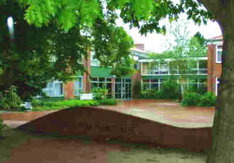 Gymnasium Warstood